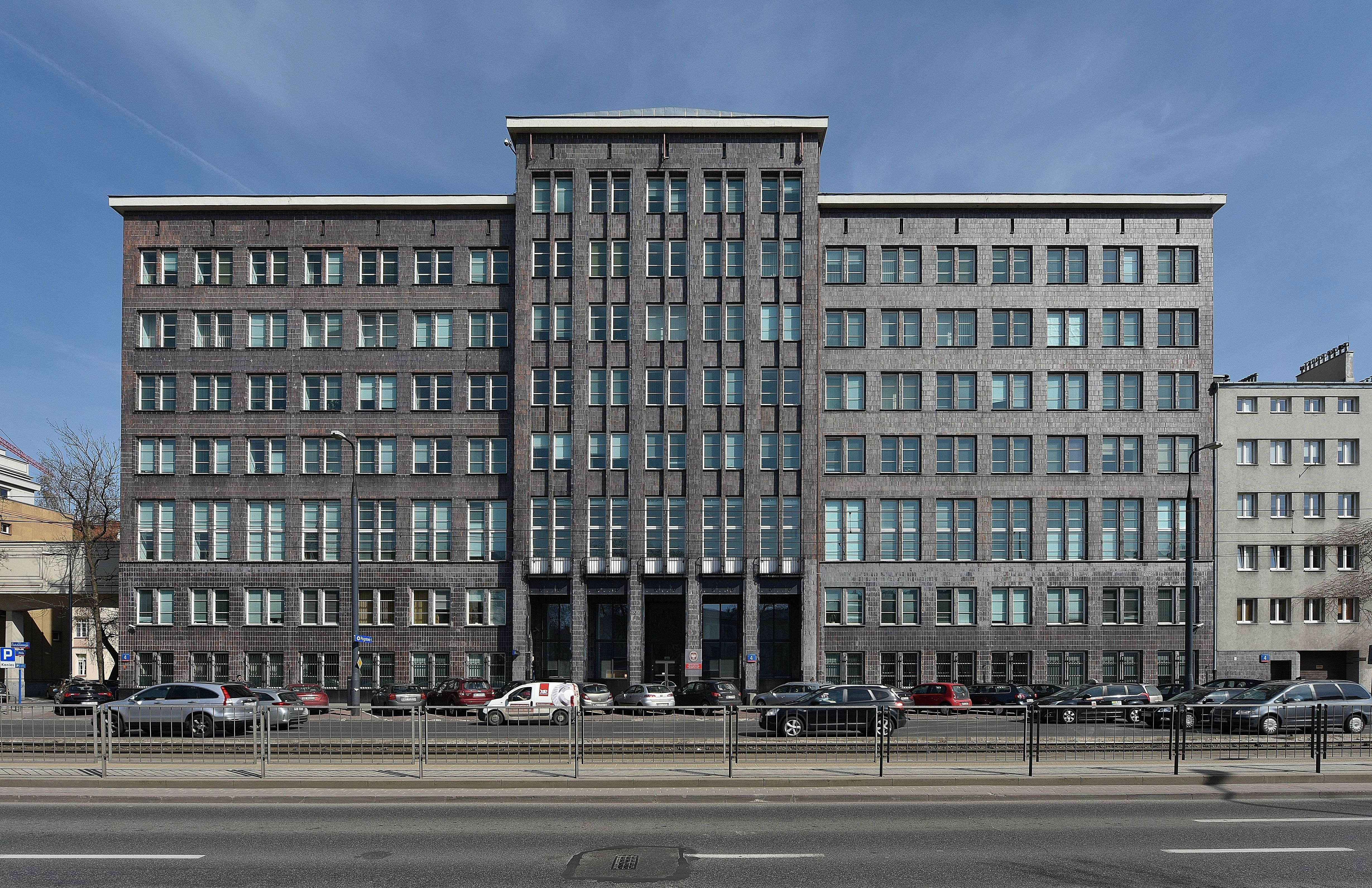 Gmach Ministerstwa Komunikacji przy ul. Tytusa Chałubińskiego 4/6 w Warszawie